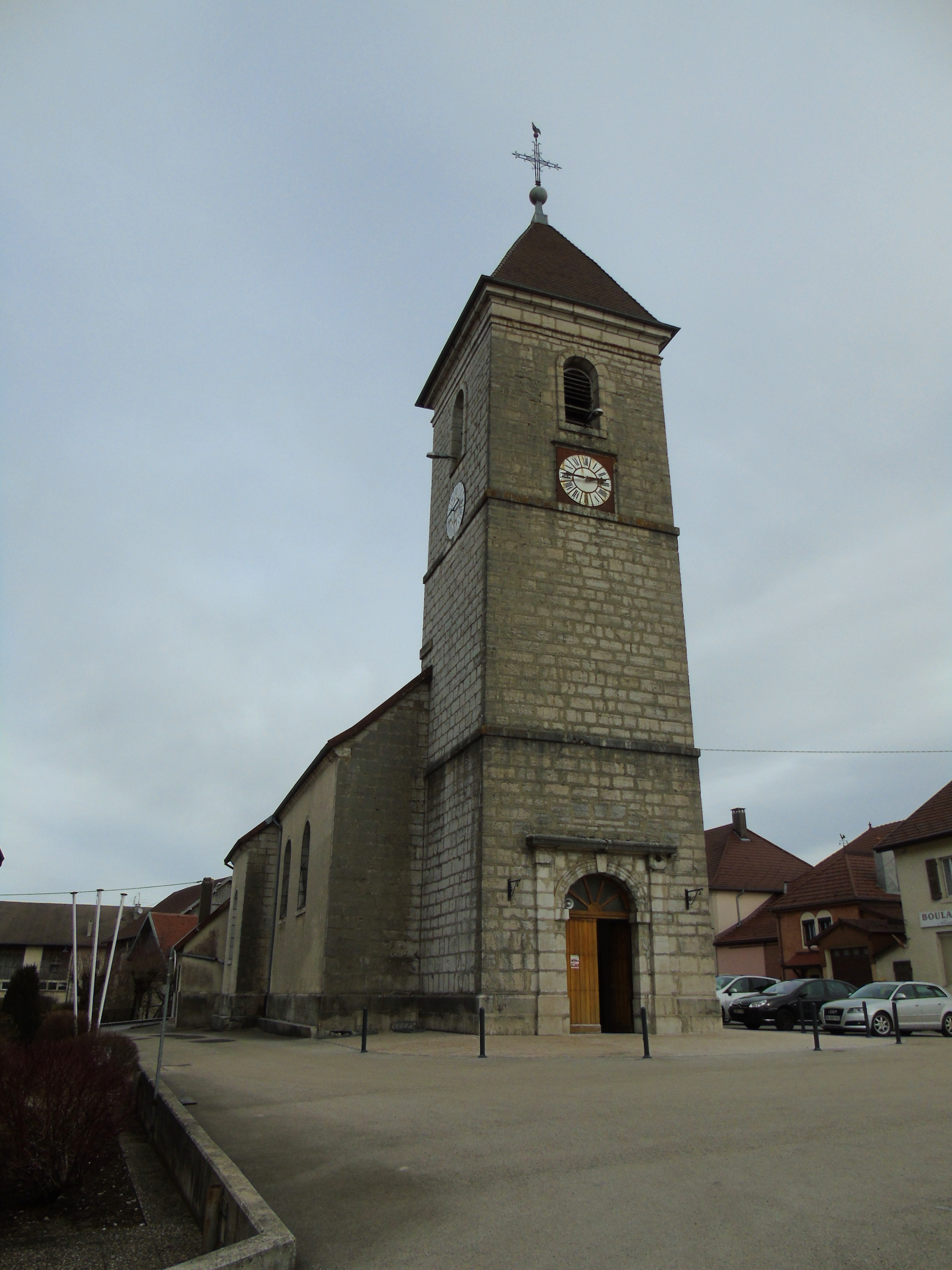 Eglise de Trévillers, Doubs, France